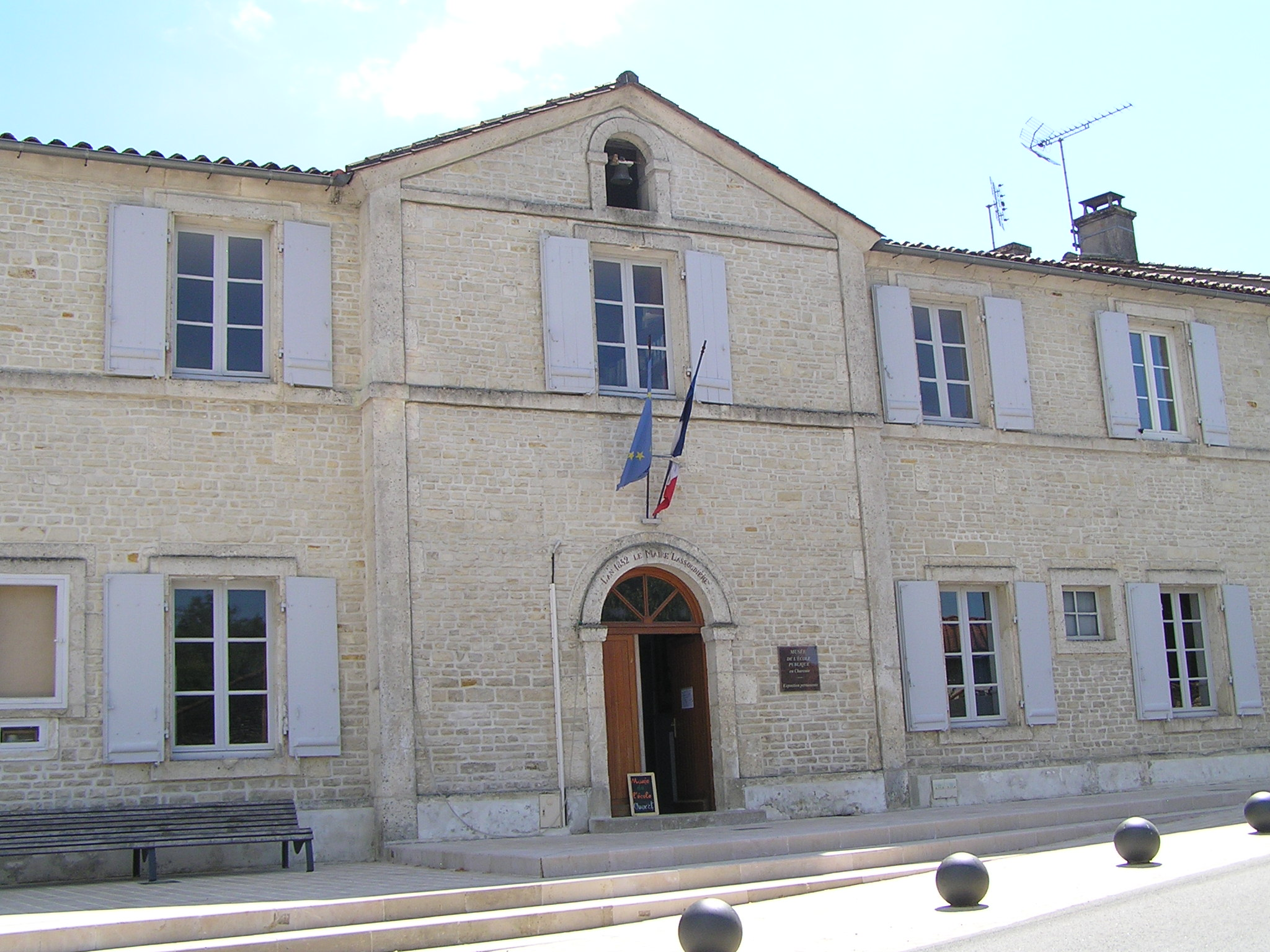 mairie de Saint-Fraigne